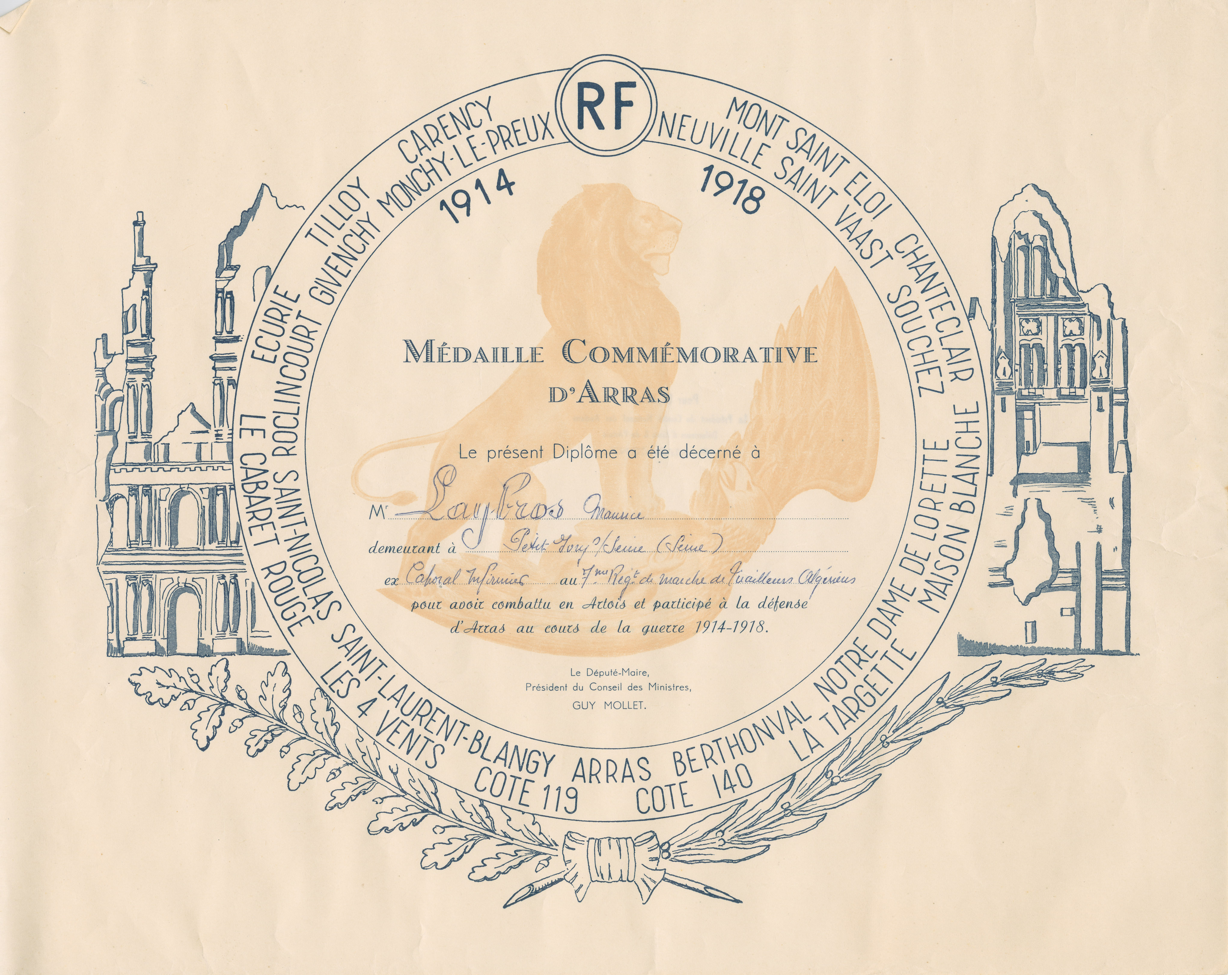 Maurice LAYBROS est caporal infirmier au 3e RMTA (Régiment de Marche de Tirailleurs Algériens). Gravement blessé par deux fois lors du conflit, plusieurs fois cité, il est récipiendaire de nombreuses décoration (croix du combattant, croix de guerre, médaille militaire). Il est aussi fait Chevalier de la Légion d'Honneur le 5 juin 1957.